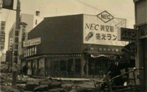 エディオンの母体の一部デオデオの前身、第一産業株式会社の創業時の様子